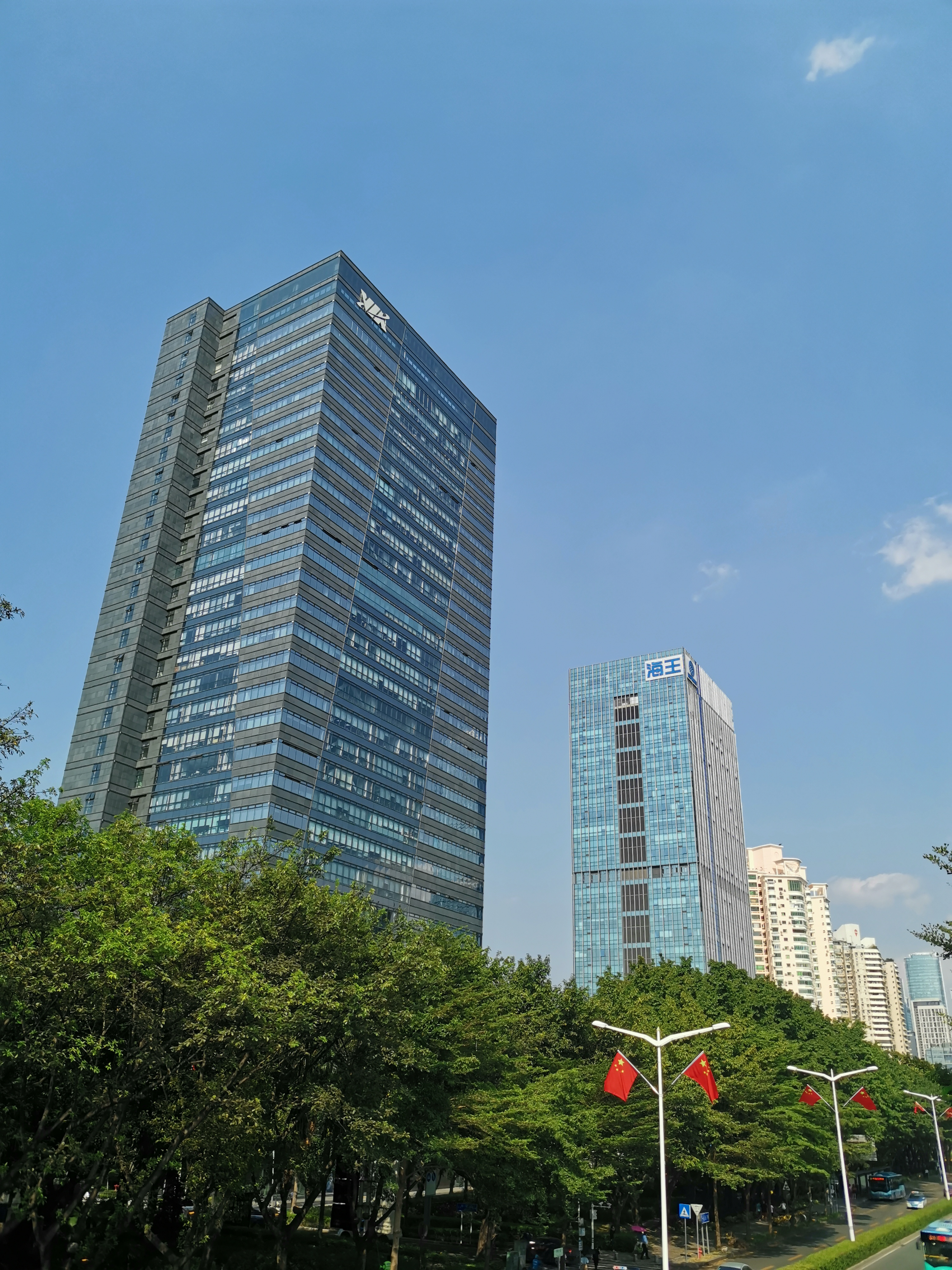 深圳威盛科技大厦，是威盛科技和HTC在深圳分部所在